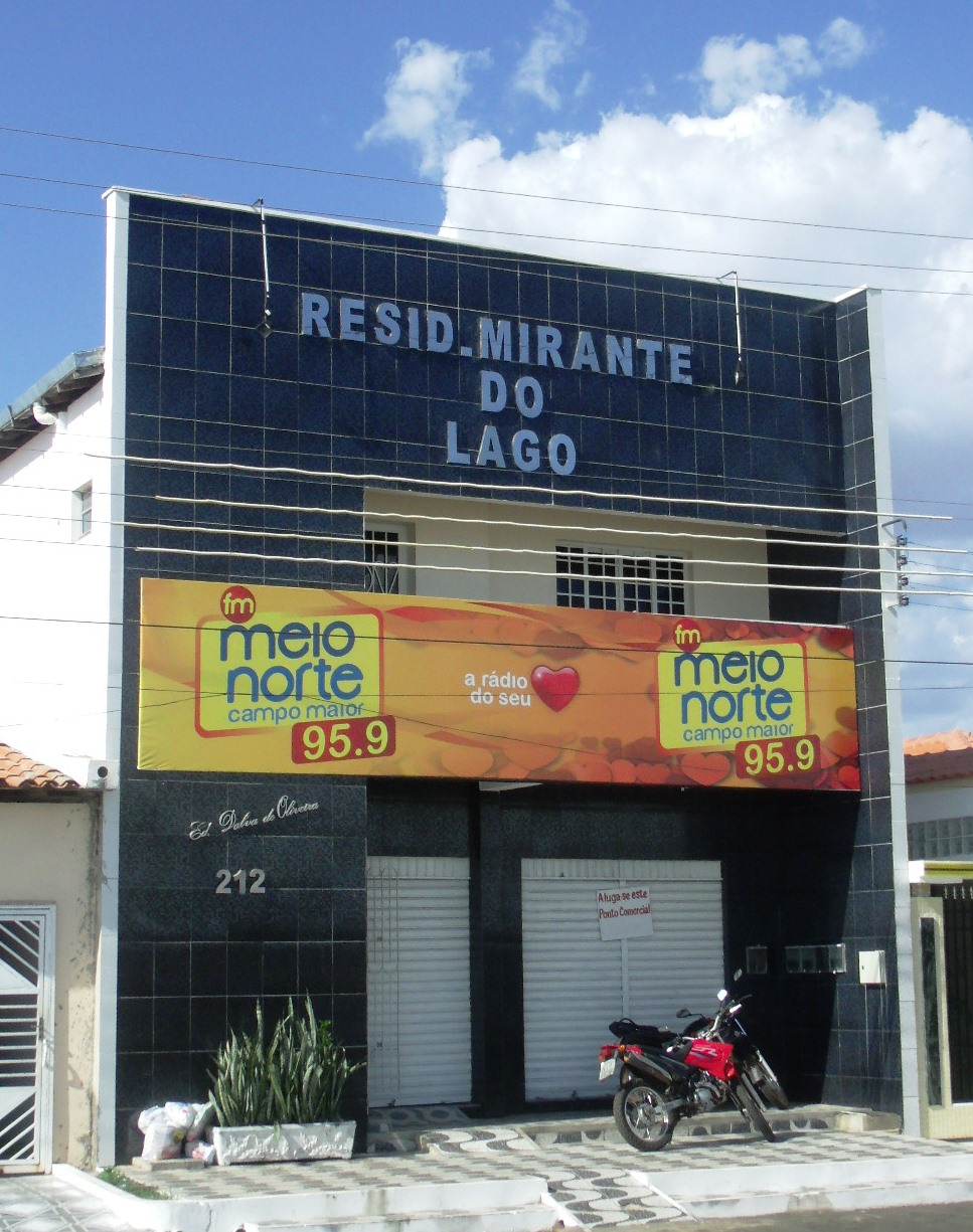 Prédio da rádio meio Norte de Campo Maior, no Piauí.